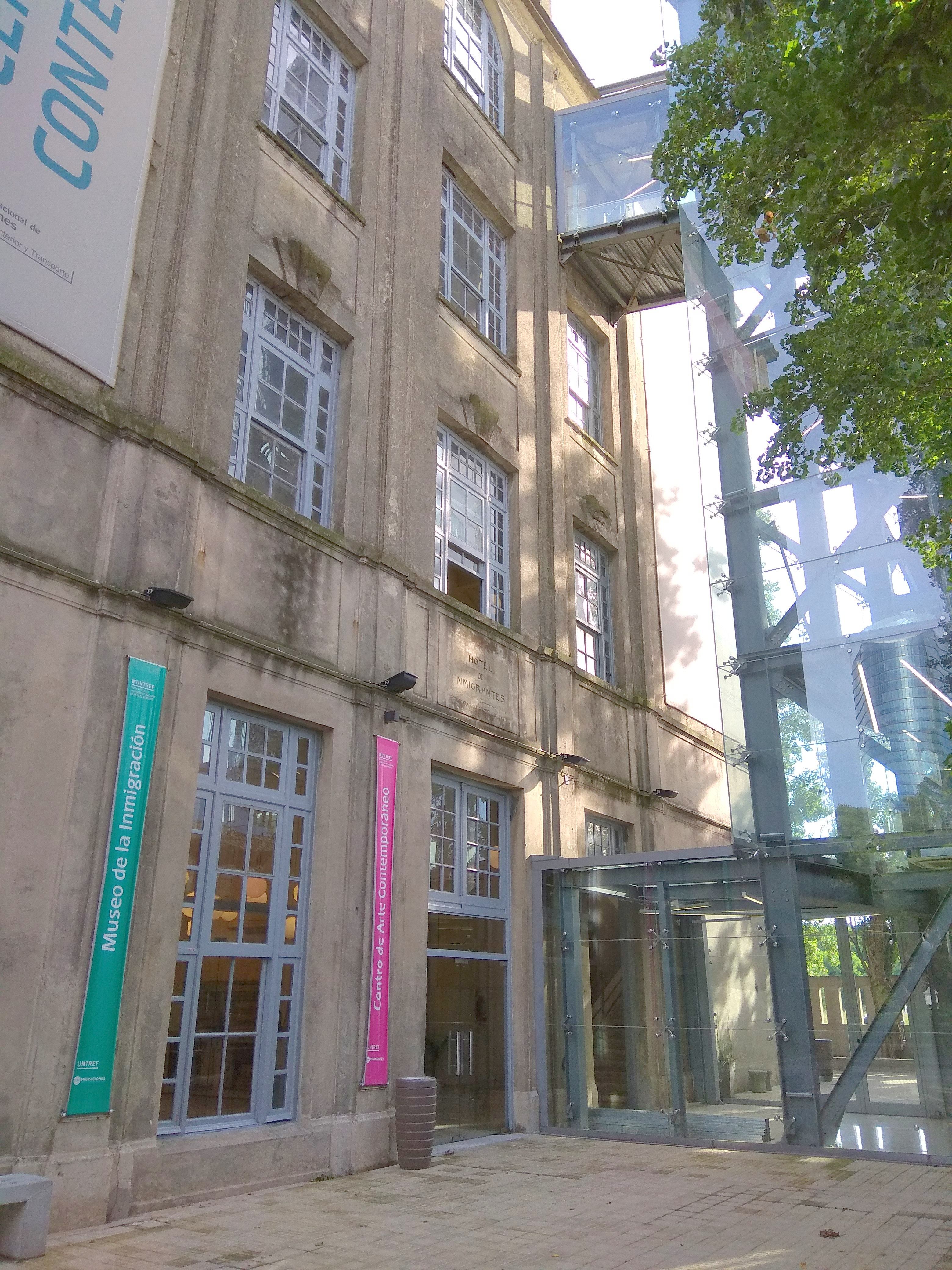 Useljenički muzej, Buenos Aires, Argentina